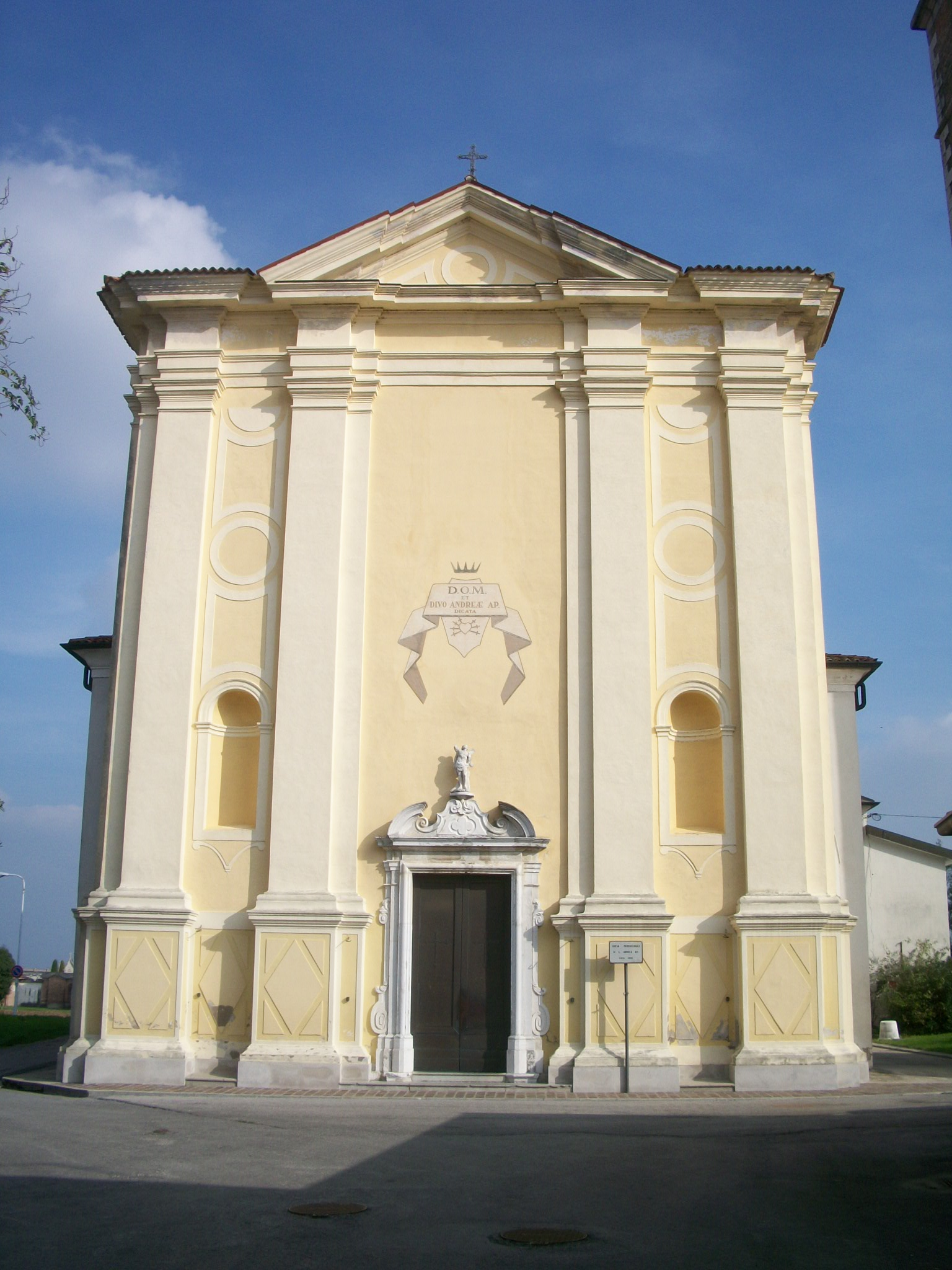 Chiesa Sant'Andrea Apostolo